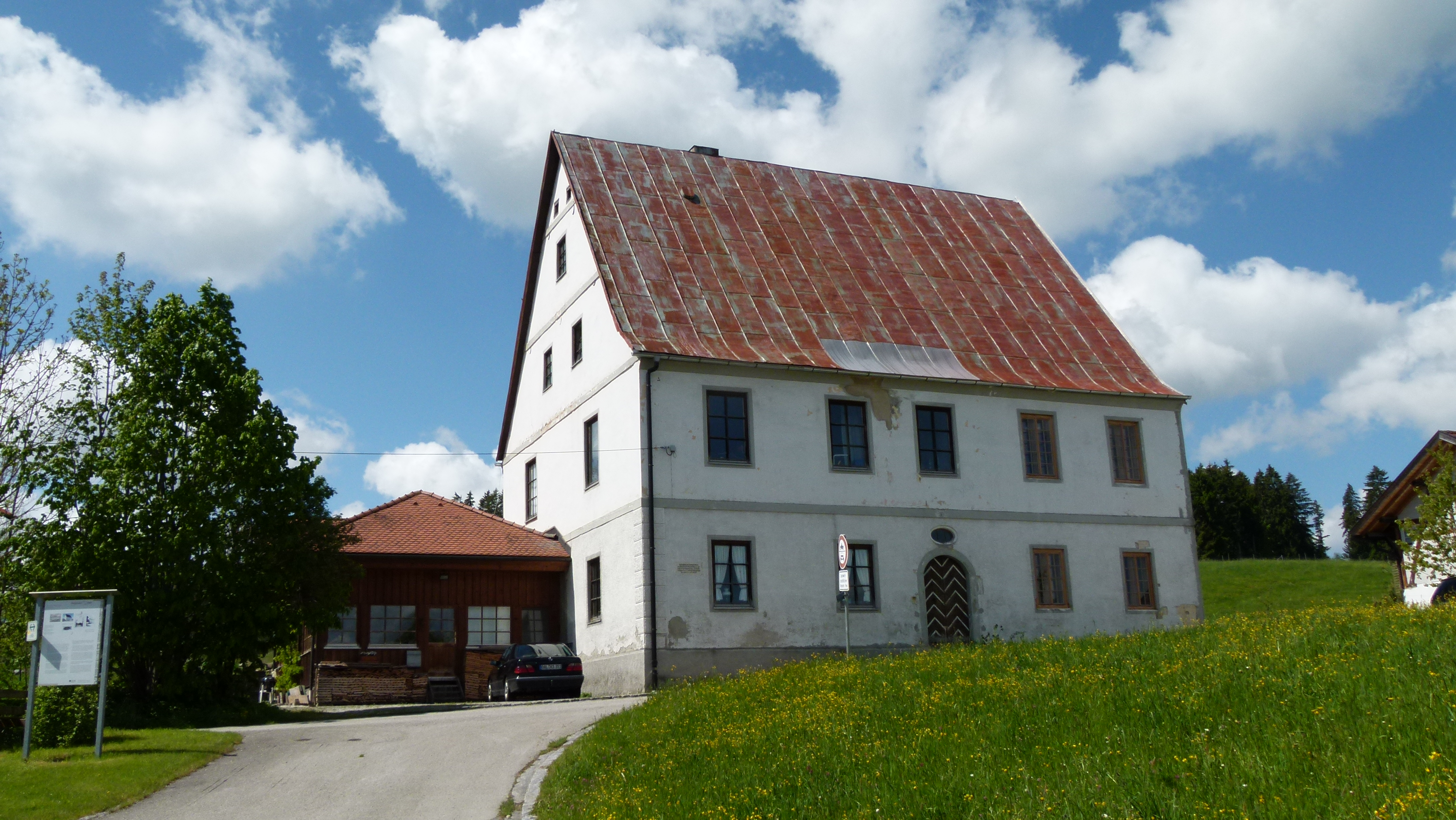 Schlösschen in Weizern in Eisenberg (Allgäu)